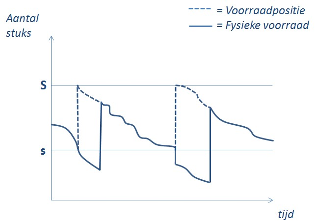 Een illustratie van de werking van een minimum-maximum voorraadsysteem.